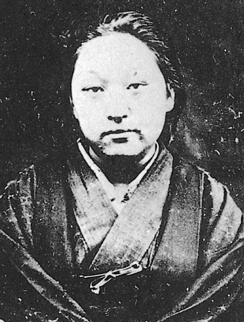 Portrait of Fukuda Hideko (福田英子, 1865 – 1927)